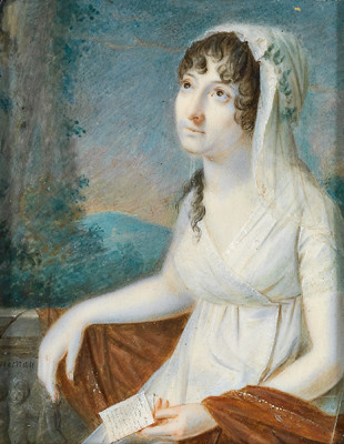 Bildnis einer verträumten jungen Frau, einen Liebesbrief haltend; Schätzpreis durch BeyArs (2008): von € 700,00 bis € 800,00